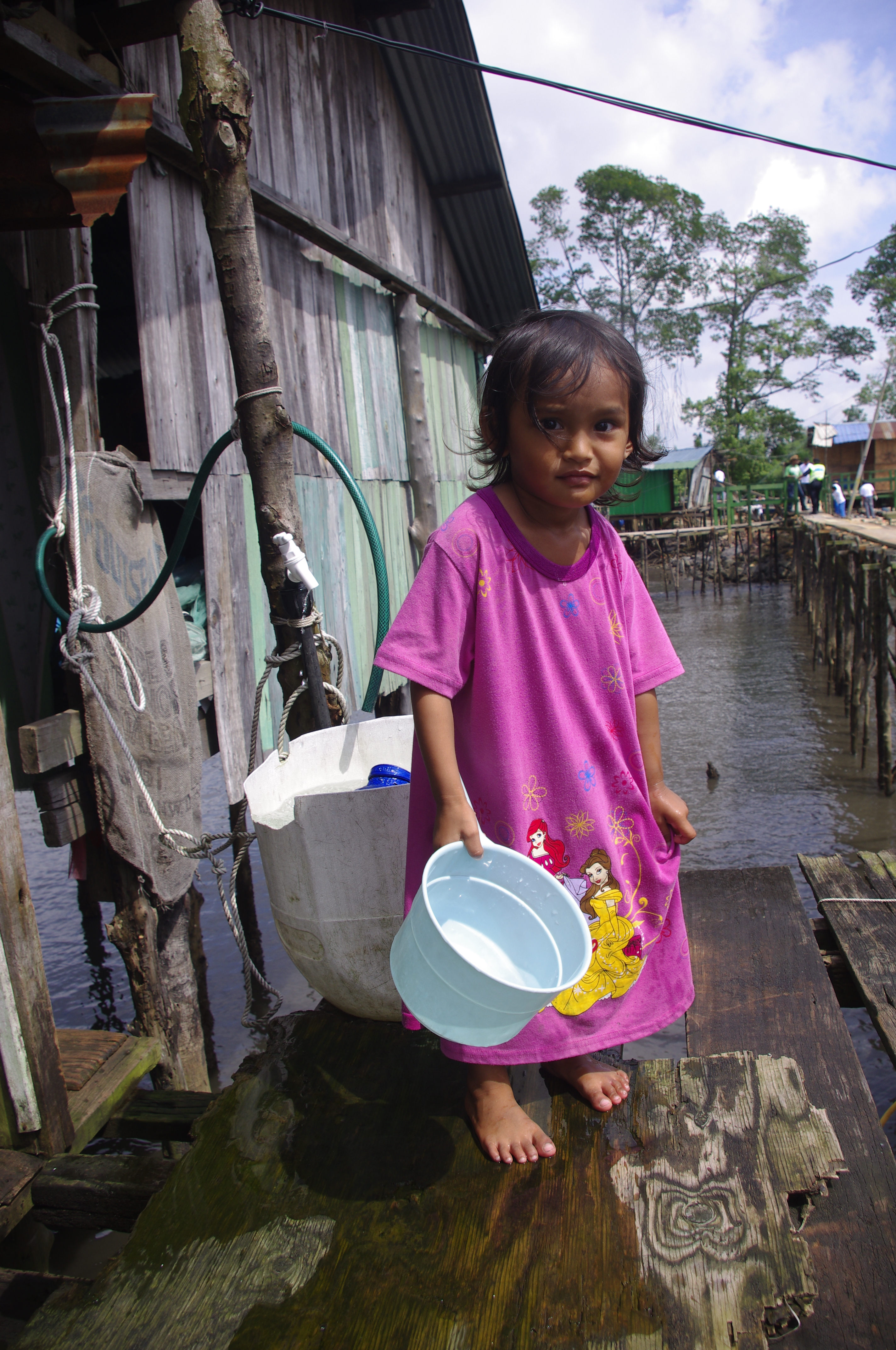 Orang Seletar